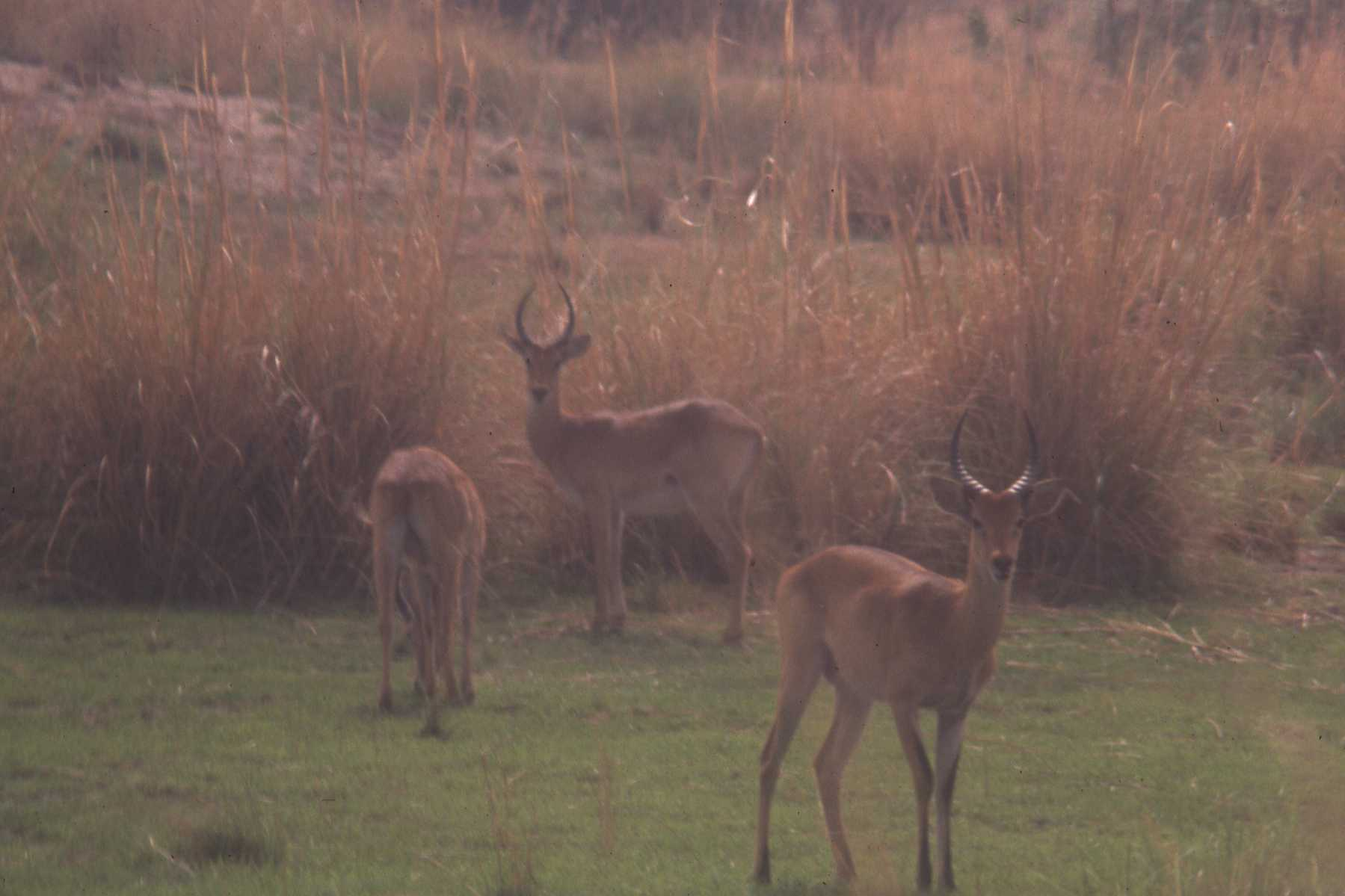 Antilopes près de Tengrela en Cote d'Ivoire